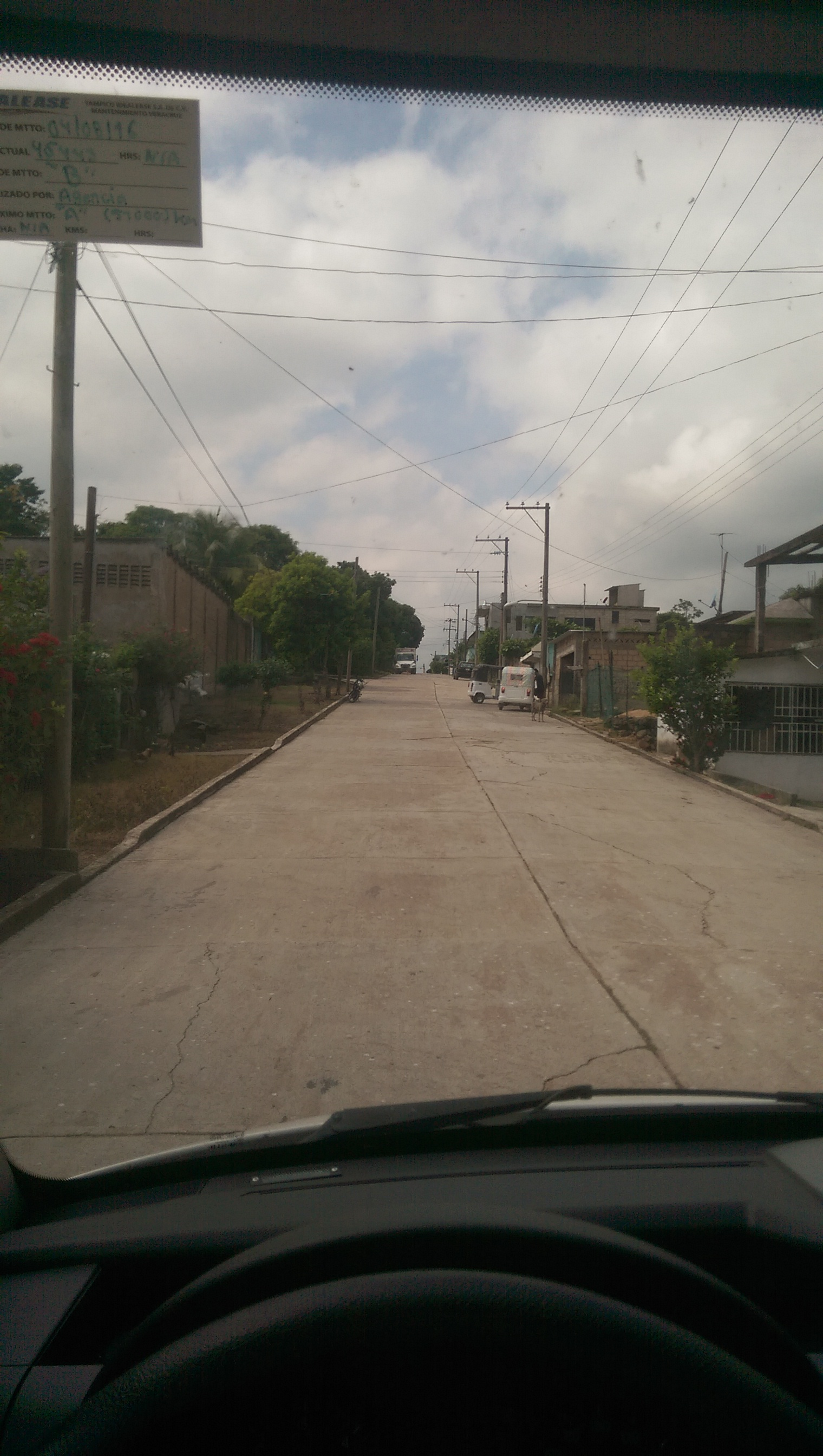 Una calle común en la cabecera de Texistepec